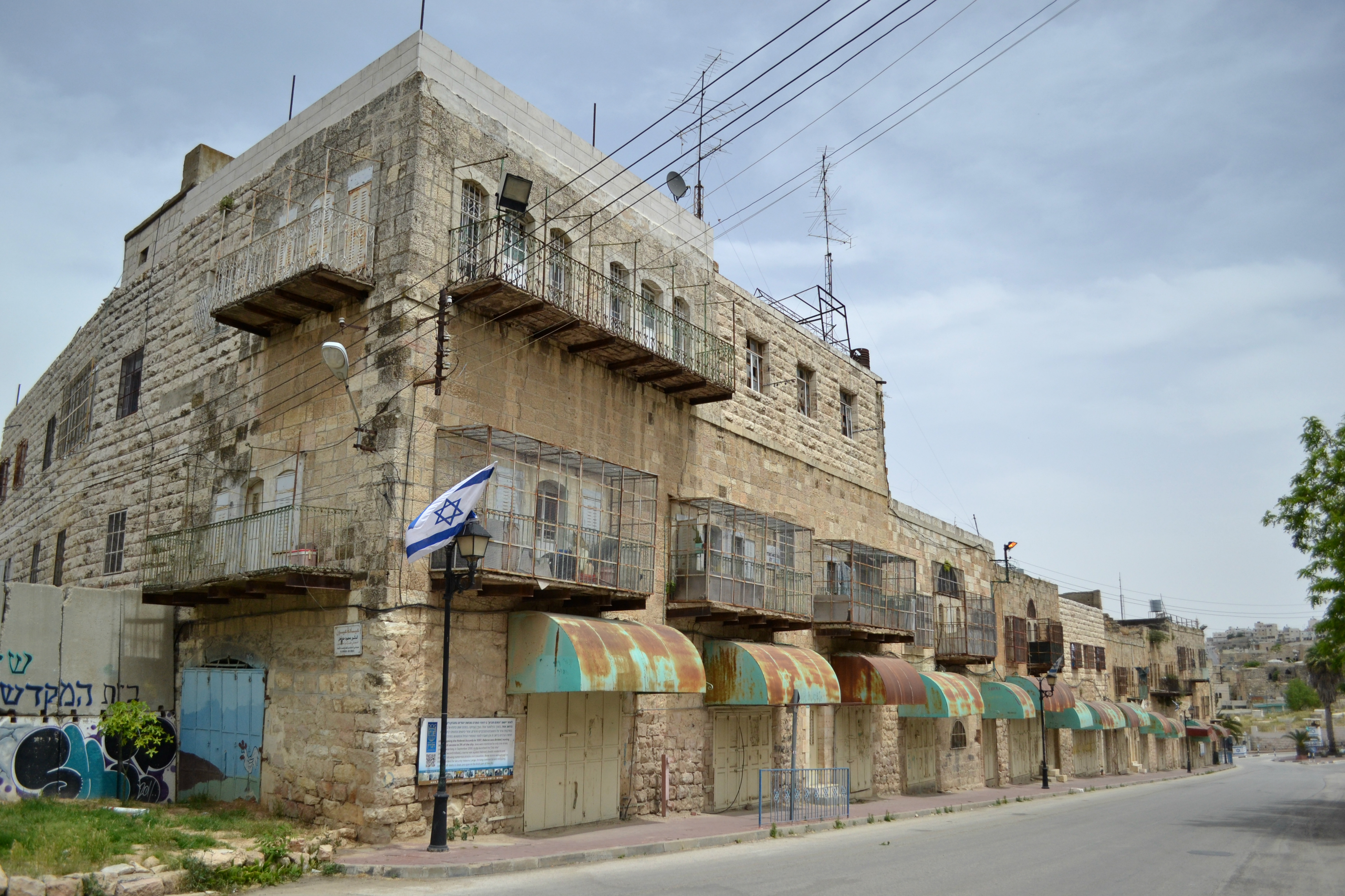 Al-Shuhada Street